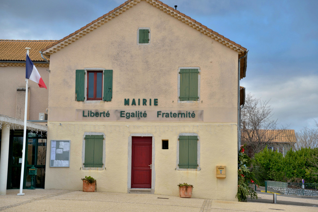 la mairie